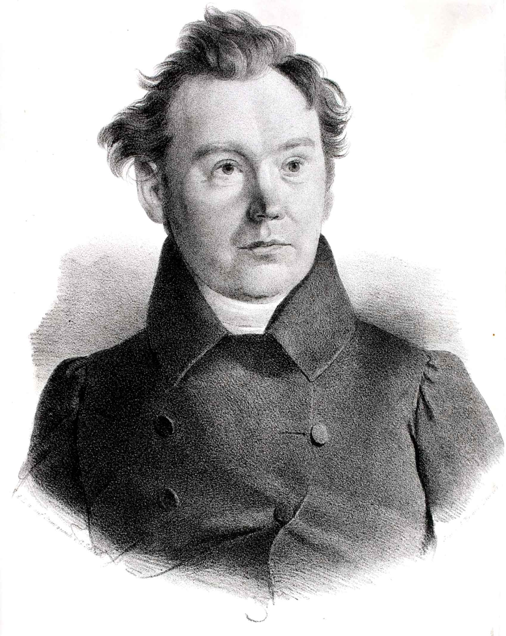 Georg Benedikt Winer (auch: Johann Georg Benedict Wiener; 1789-1858), deutscher evangelischer Theologe und Philologe